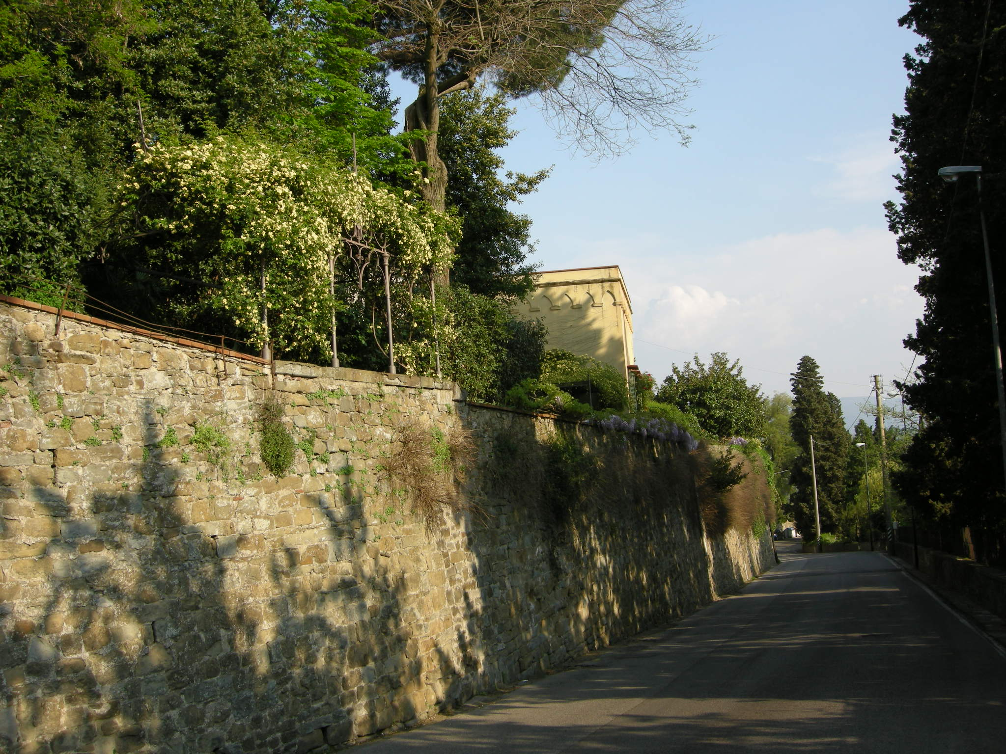 Villa la Lastra da via bolognese